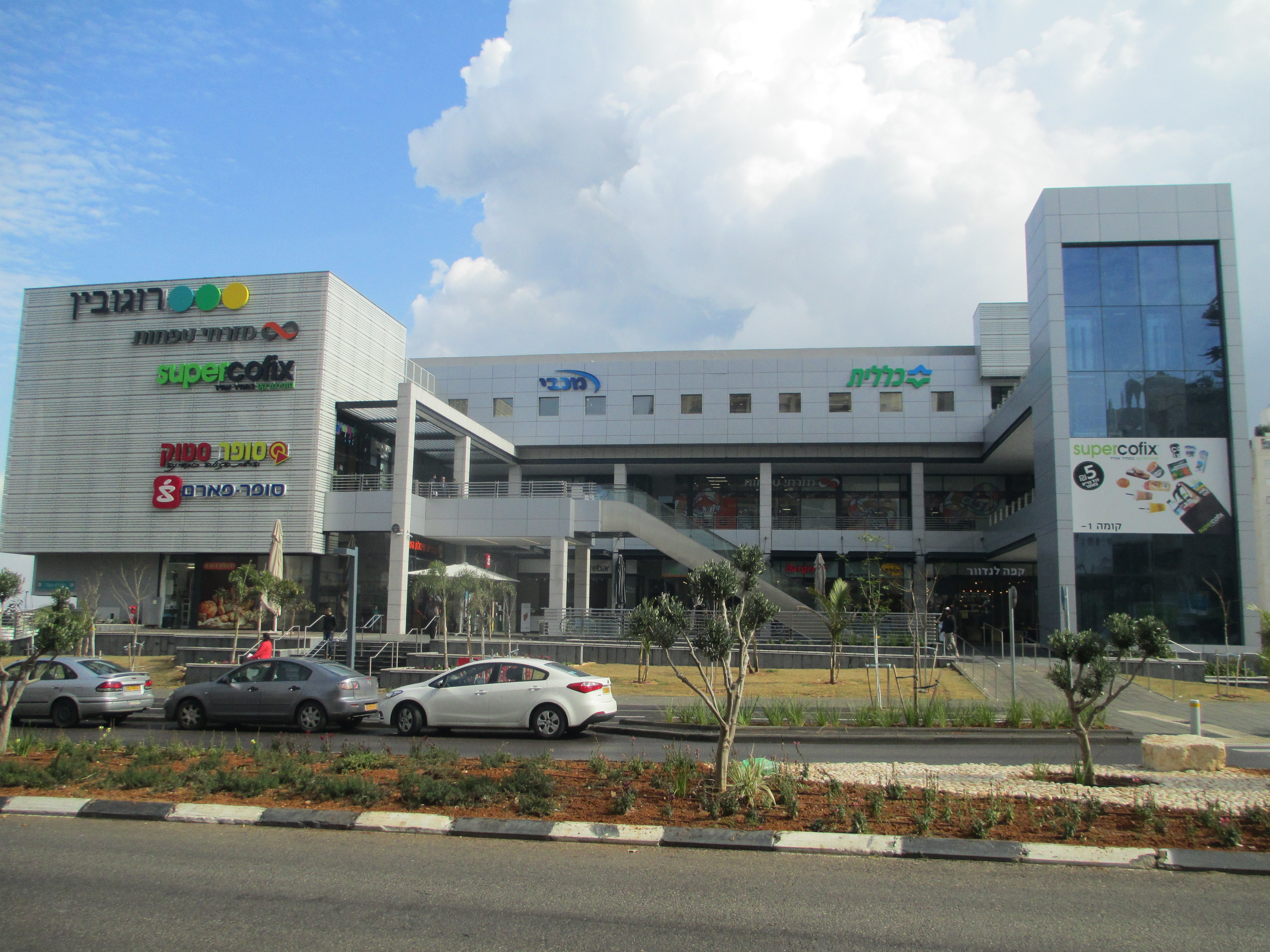 מרכז רוגובין בגבעת שמואל